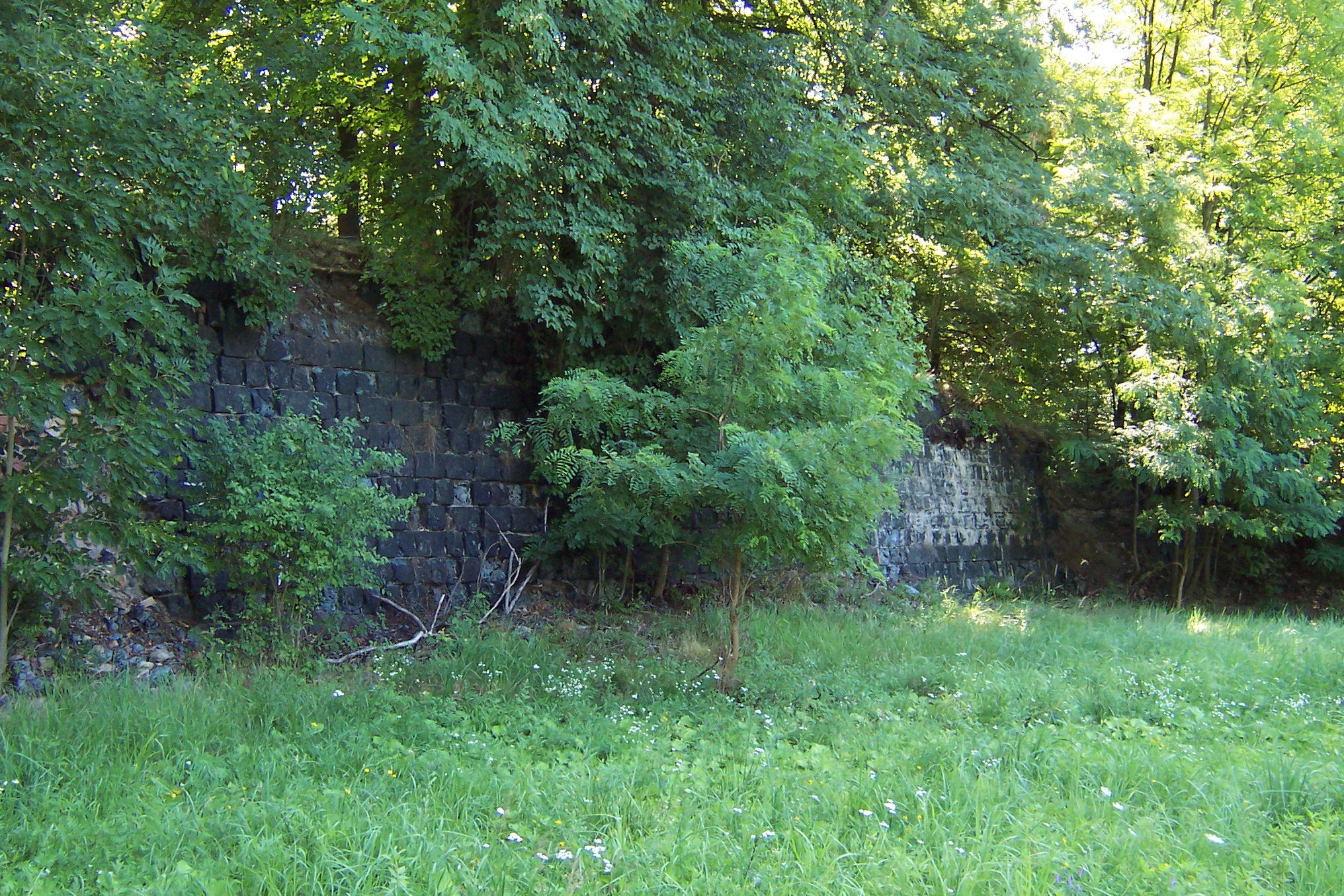 Stützmauer aus Raseneisensteinschlacke